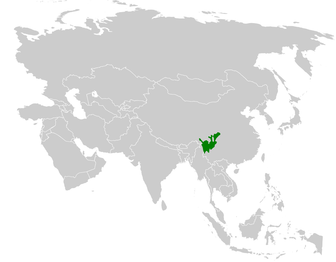 Aegithalos bonvaloti distribution map, based on